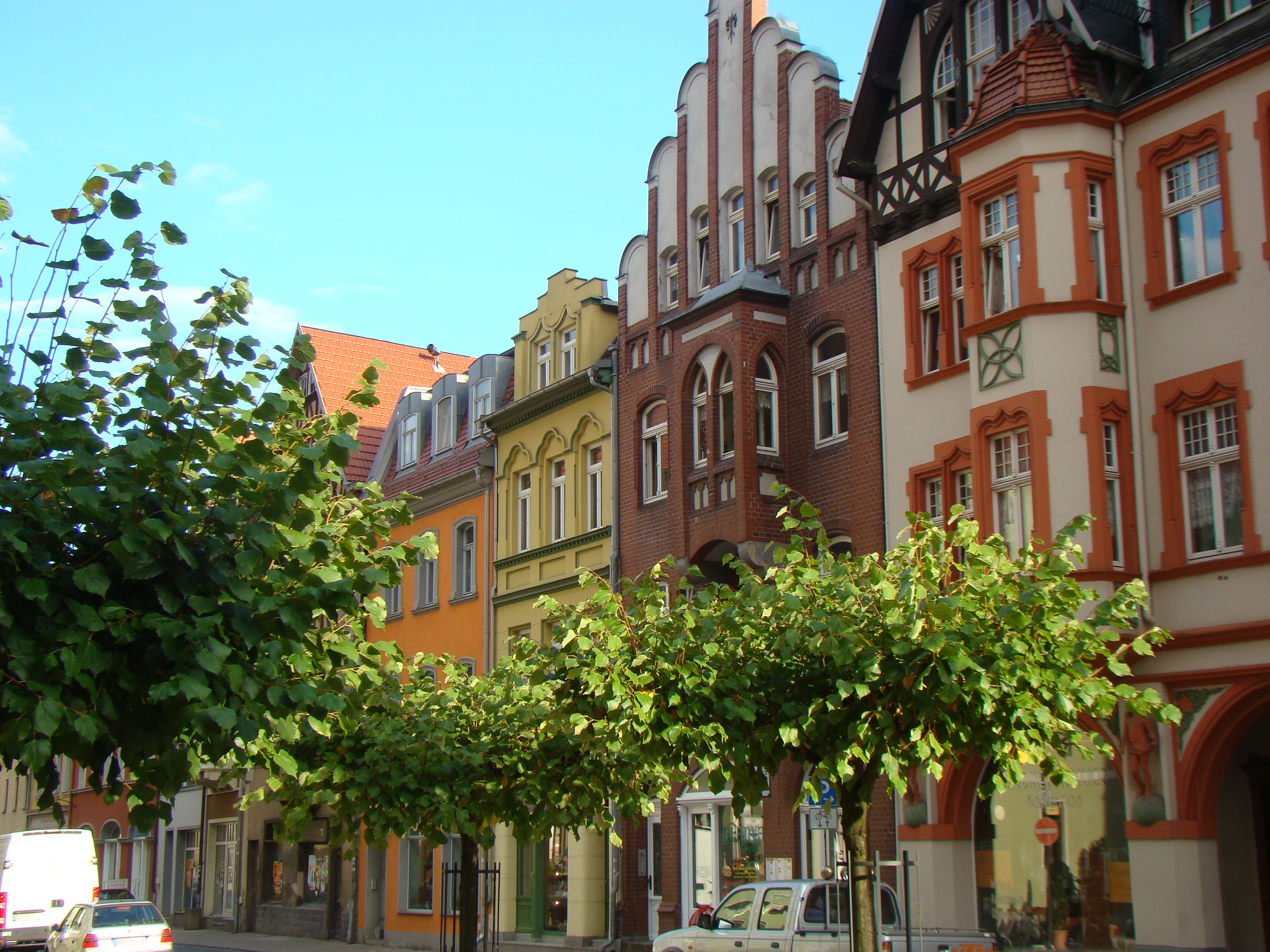 Neustadt an der Orla, Fassadendetails im Stadtbild